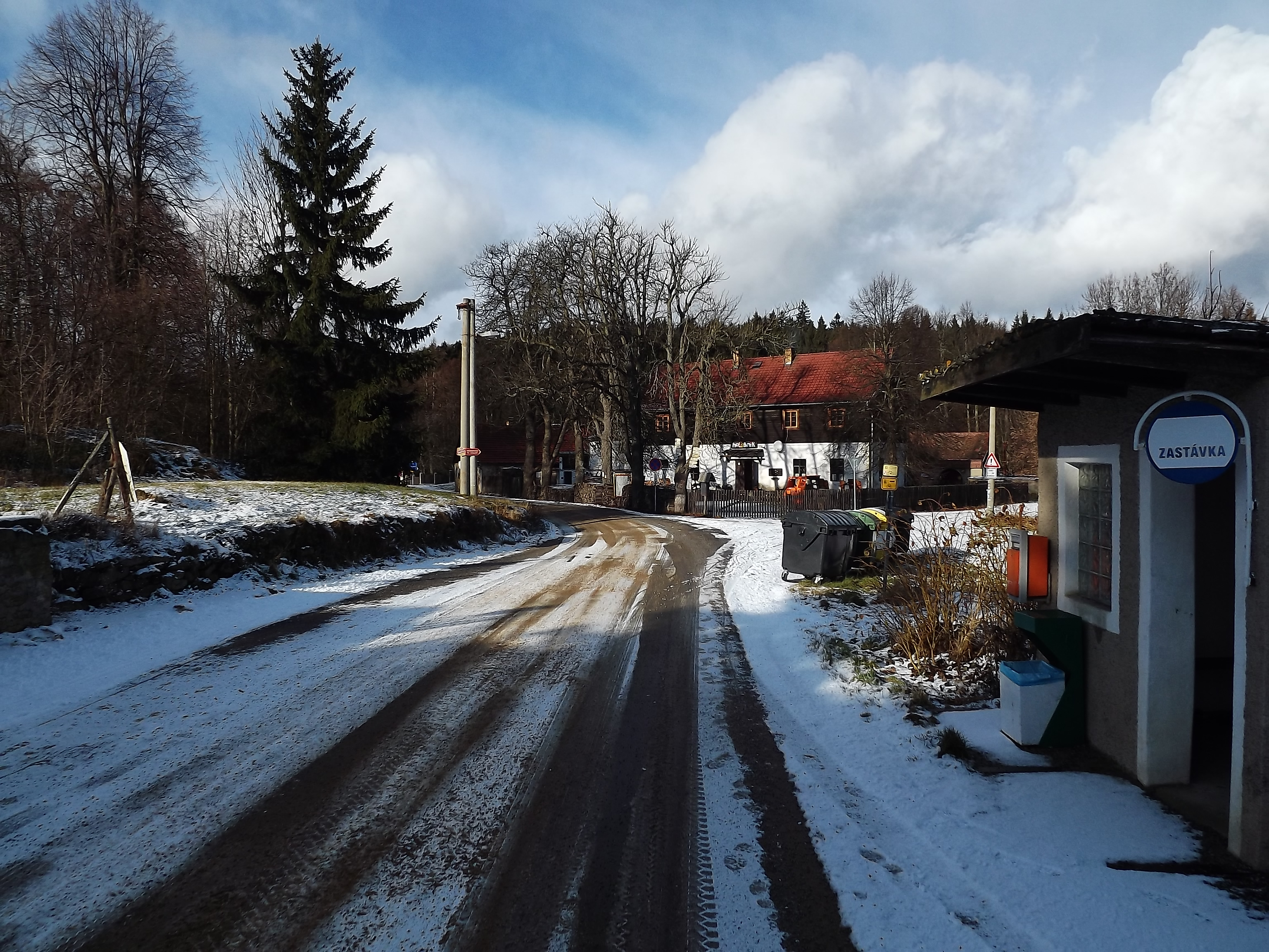 Landštejn ves